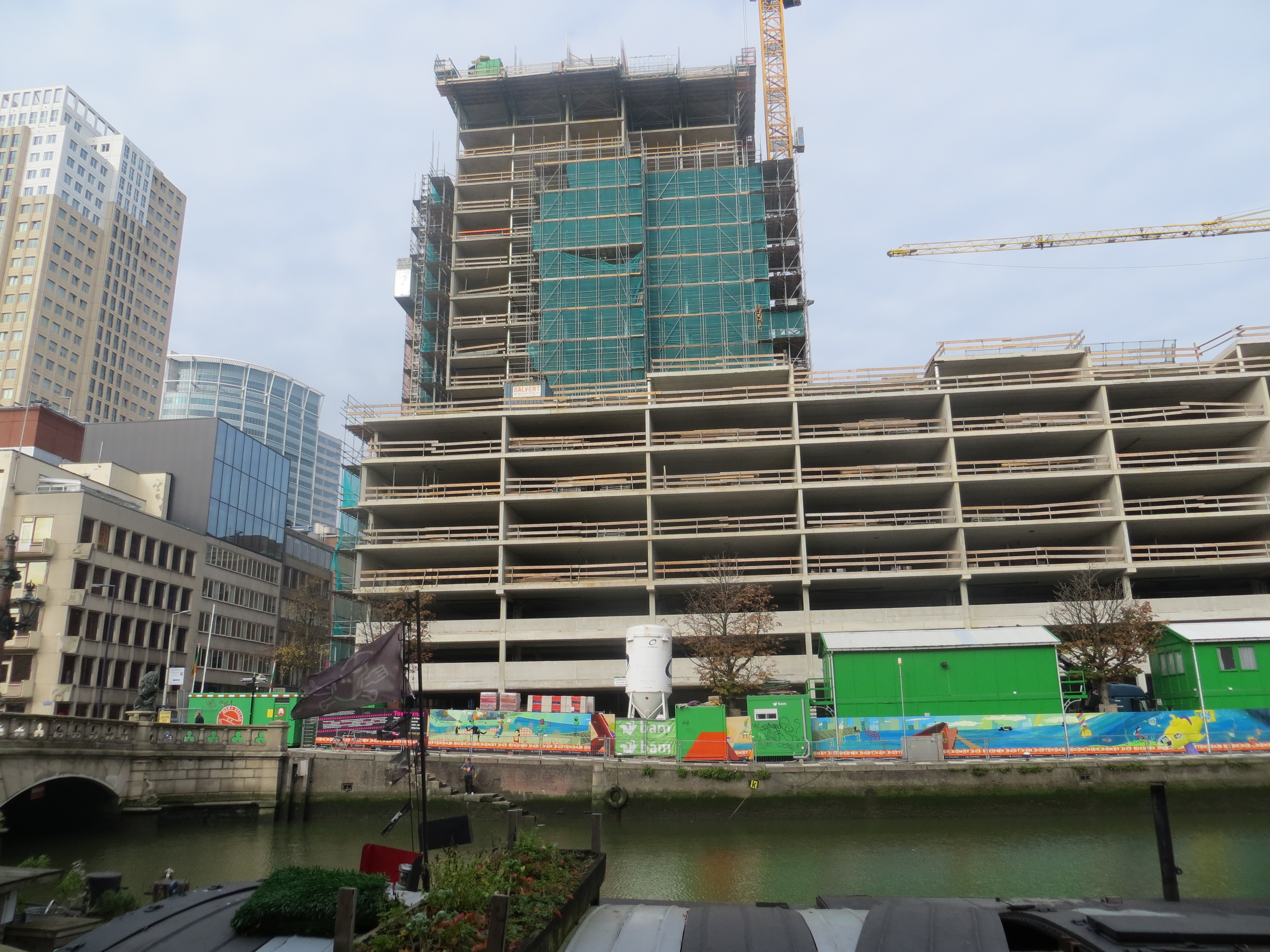 Het gebouw 100 hoog tijdens de bouw.